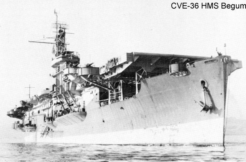 HMS Begum (D38)